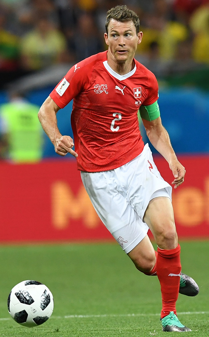 Желто-зеленая торсида на берегах Дона. Неймар и Бразилия пожаловали в Ростов!